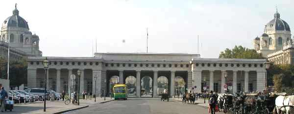 Äußeres Burgtor Heldenplatzseite